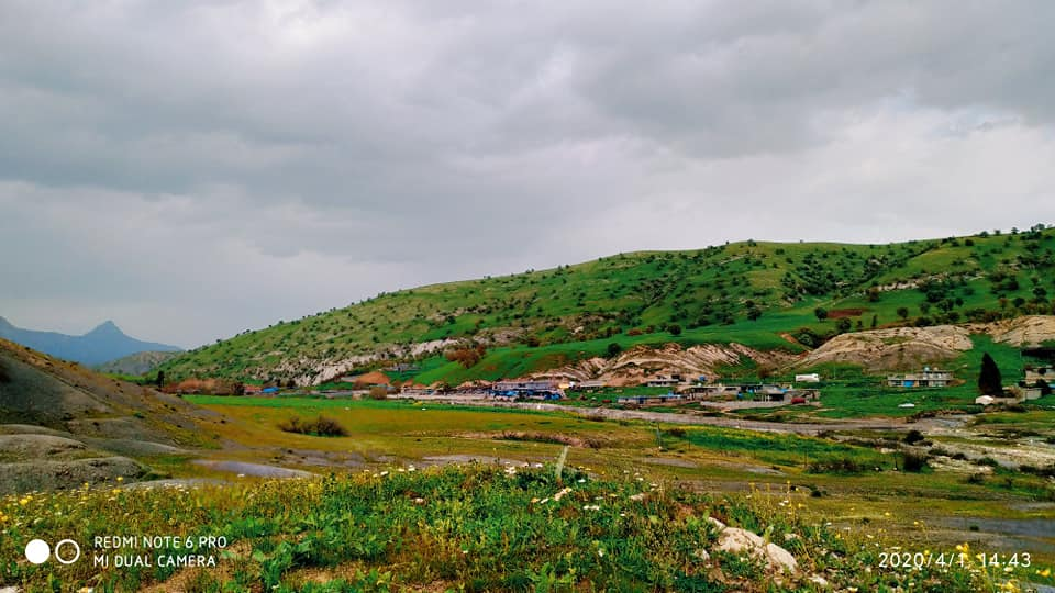 کوردی: دیمەنی گوندی پشتە